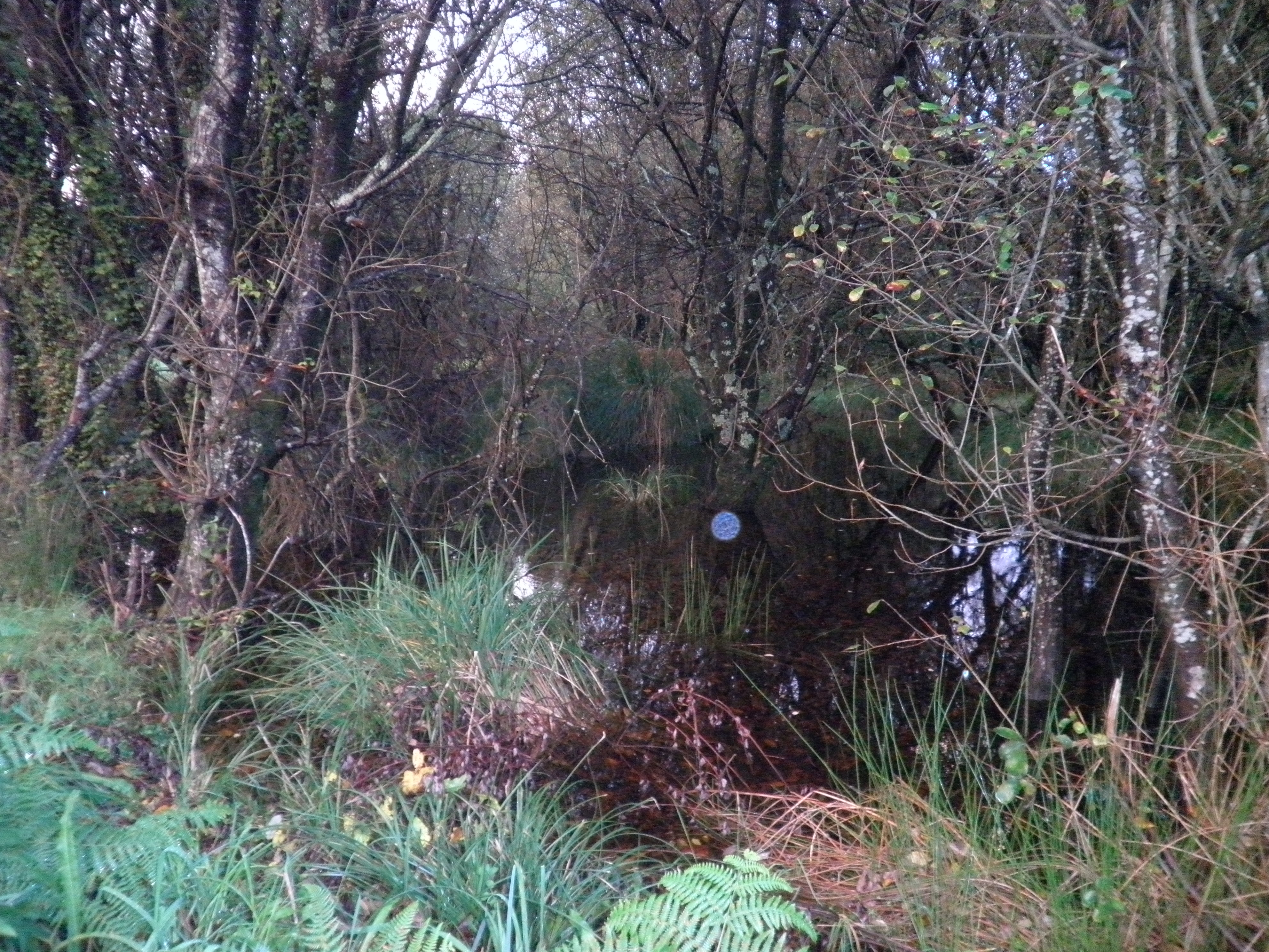 As Brañas de Laiño no lugar de Tallós, Dodro.